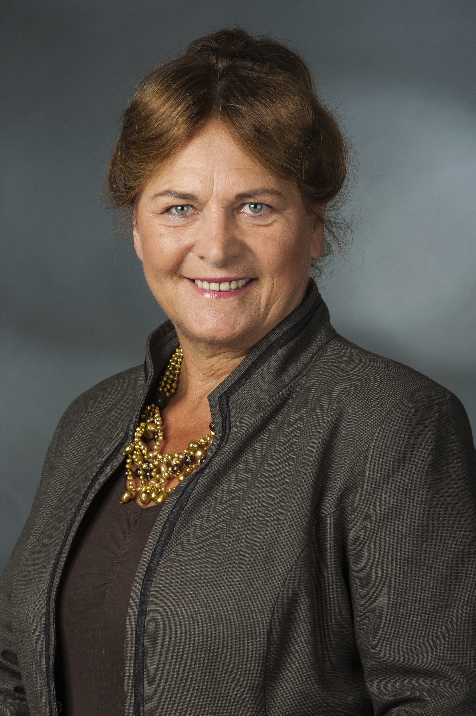 Maria Michalk geb. Ziesch (obersorbisch Marja Michałkowa, * 6. Dezember 1949 in Merka bei Radibor, Oberlausitz) ist eine deutsche Politikerin (CDU) sorbischer Nationalität.